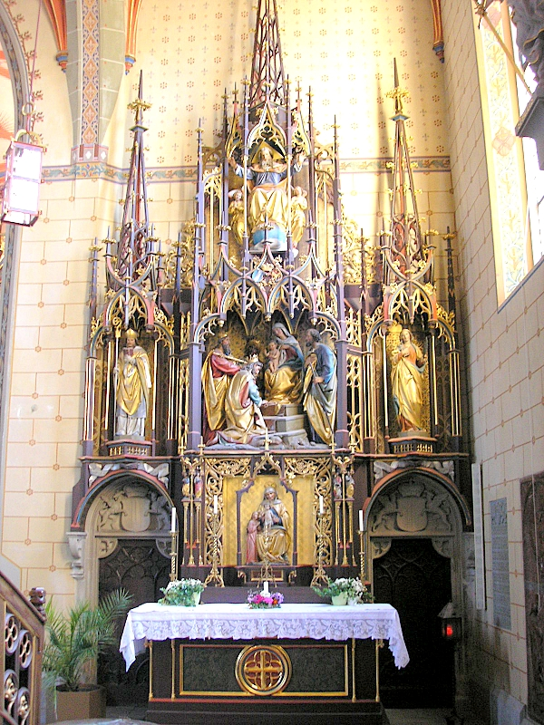 Pfarrkirche St. Anna (Waal bei Landsberg am Lech, Landkreis Ostallgäu, Bayerisch-Schwaben). Der südliche Seitenaltar (1856/57). Eigene Aufnahme, Juli 2007 / Parish church St. Anne (Waal near Landsberg am Lech, Bavaria, Germany). The southern side altar (1856/57). Own photo, July 2007